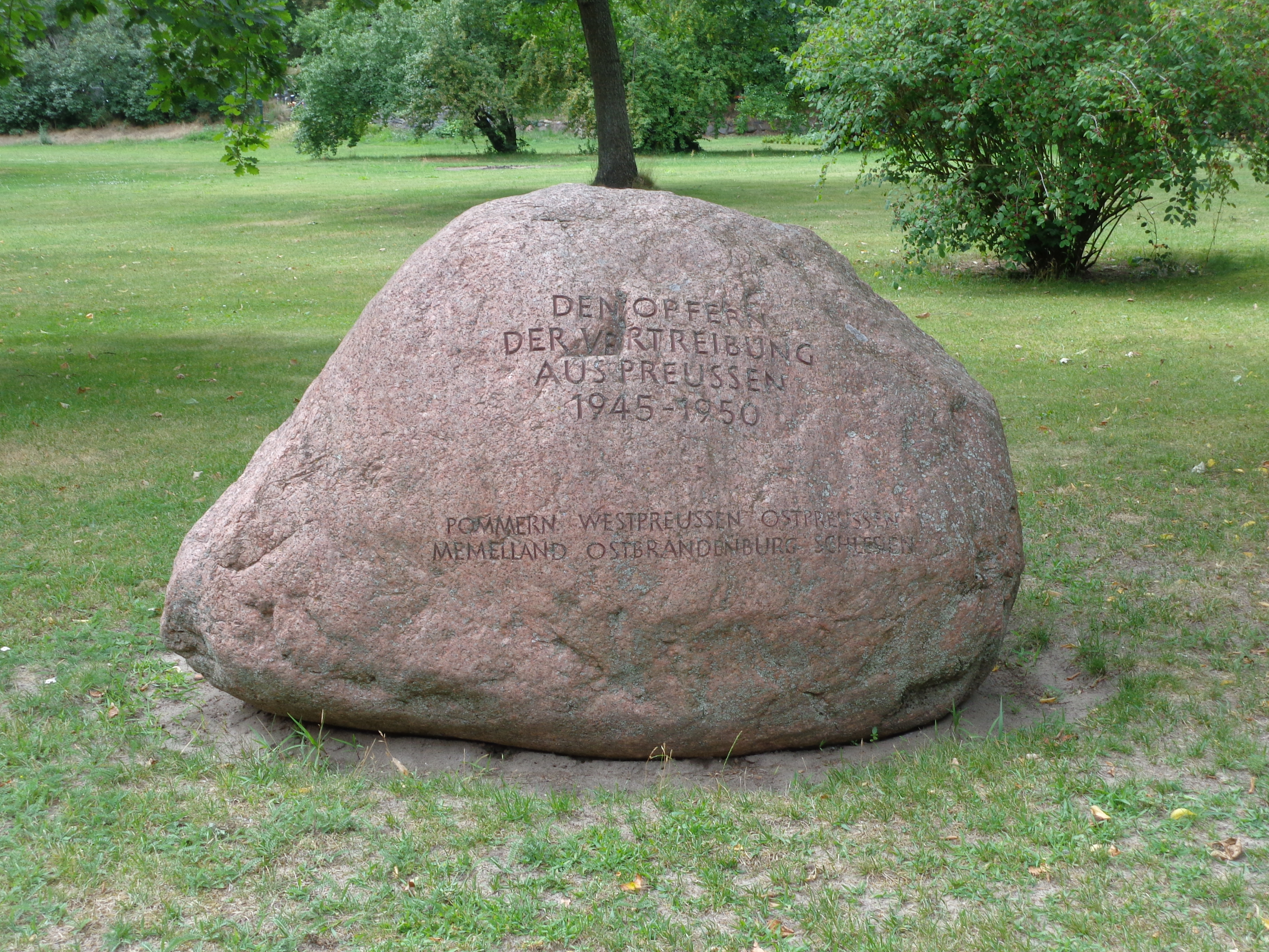 Gedenkstein für die Vertriebenen aus den deutschen Ostgebieten in Wustrau